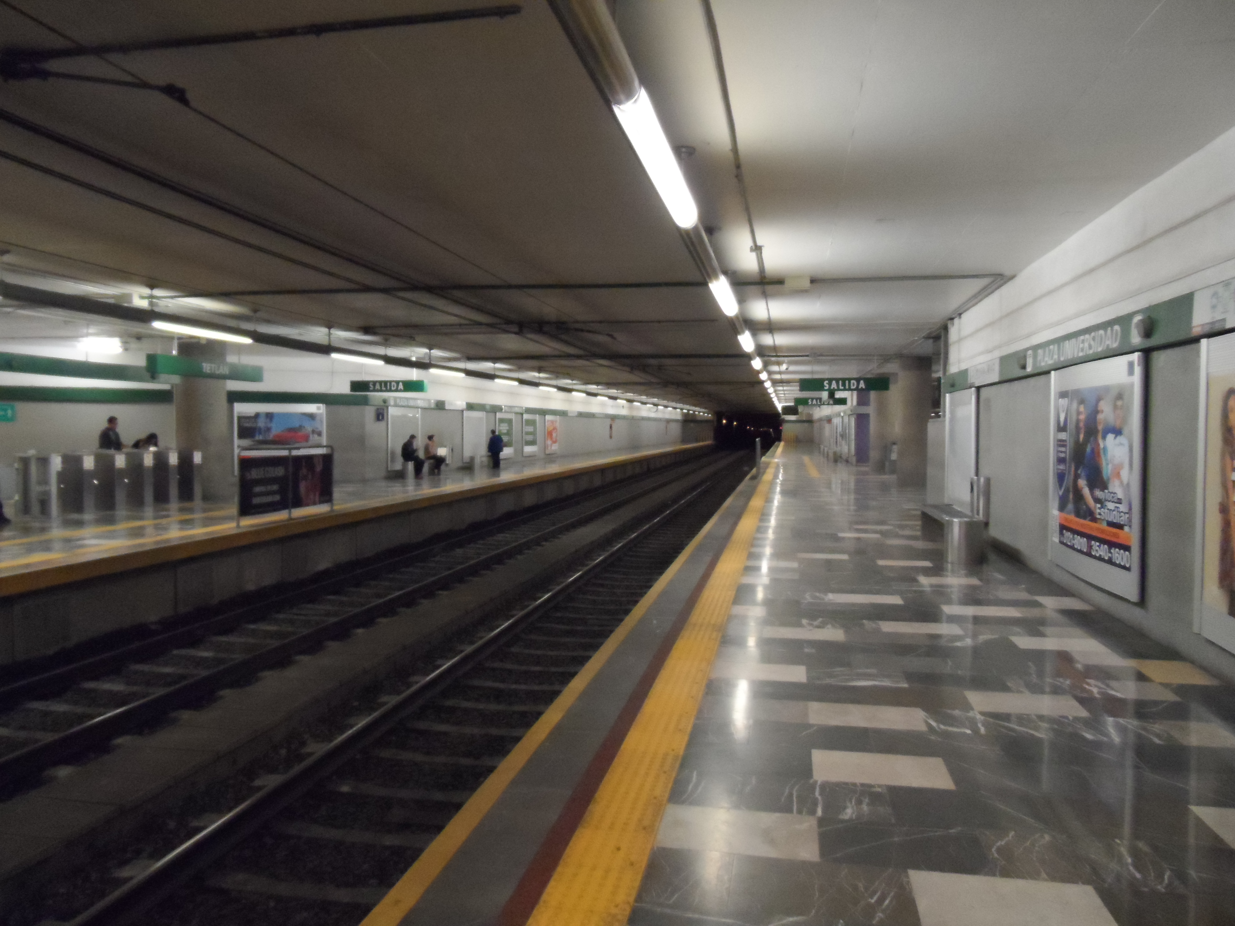 La estación "Plaza Universidad" de la Línea 2 del Tren Ligero de Guadalajara.